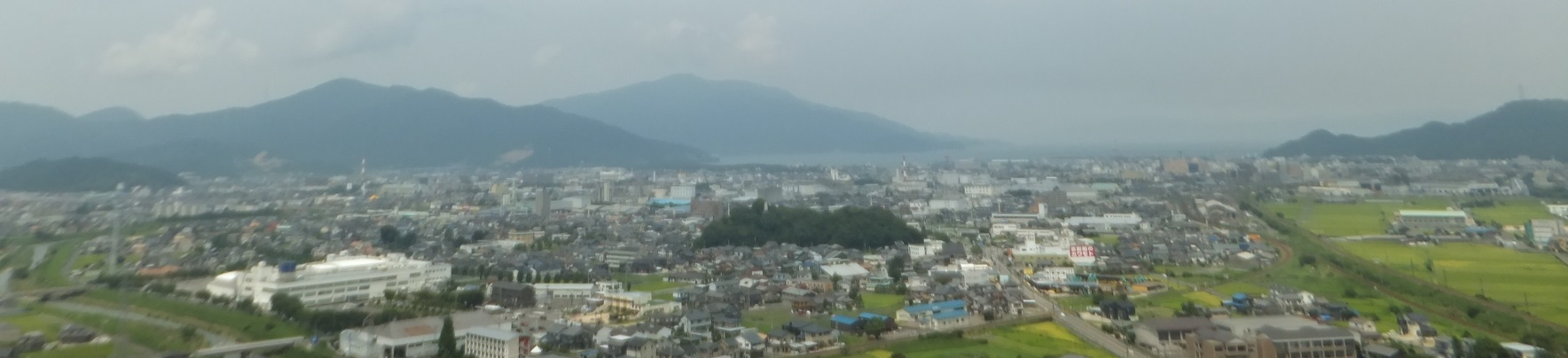 敦賀市中心部遠景